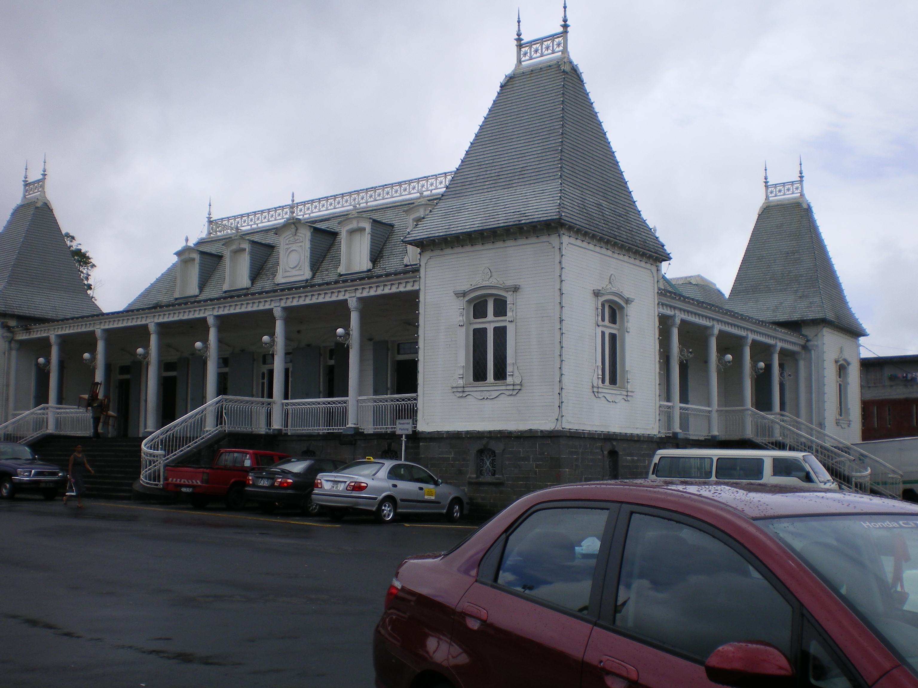 Hôtel de ville (Town hall), Curepipe, Mauritius